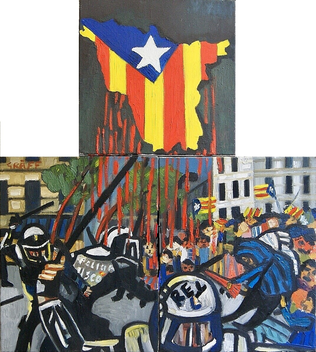 Matthias Laurenz Gräff, Triptychon "Katalanisches Tryptichon", Öl auf Leinwand, 50x40 / 50x40 cm / 40x40 cm, , 2017